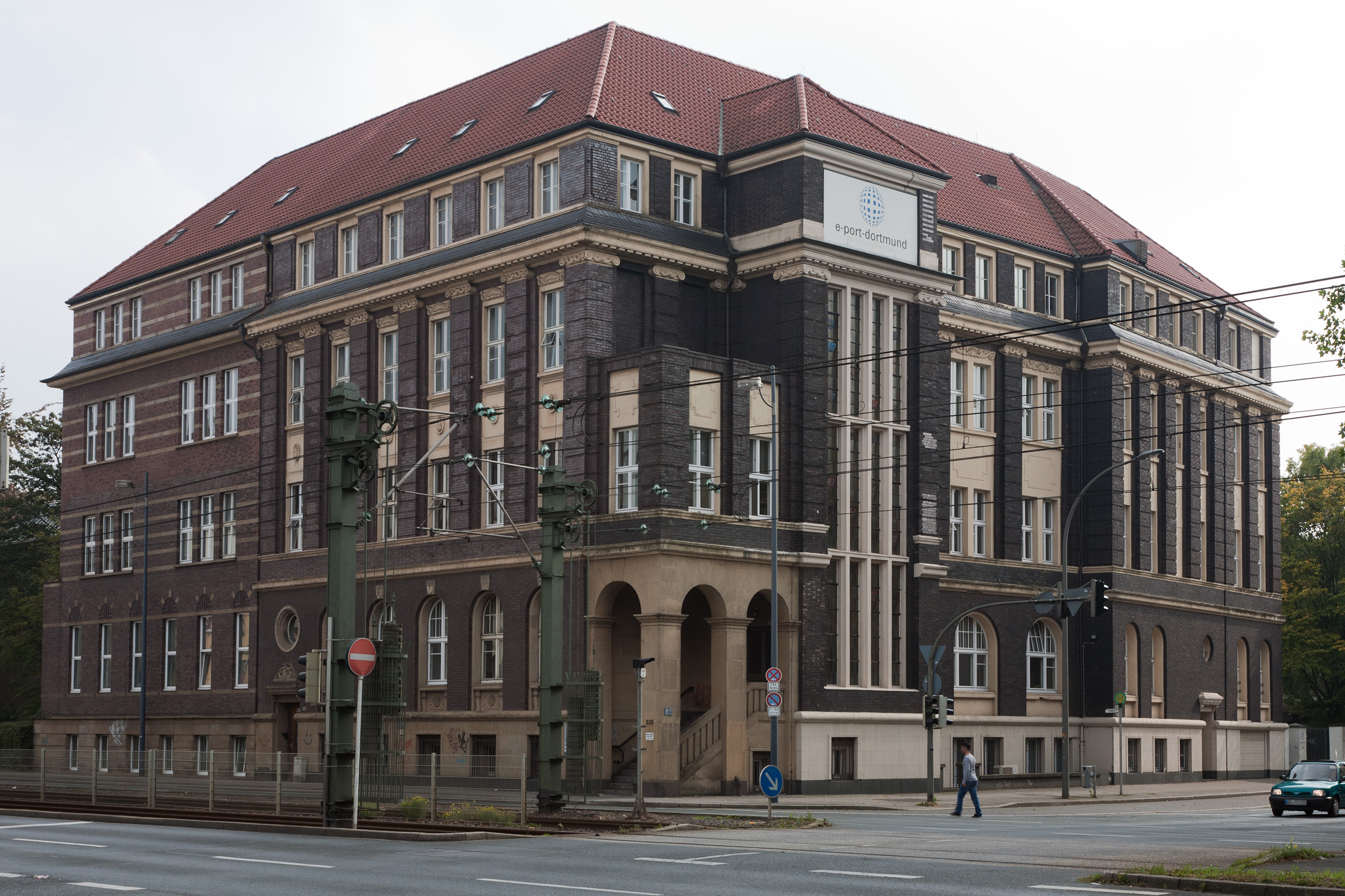 ehemaliges Verwaltungsgebäude Rhenus/WTAG in Dortmund